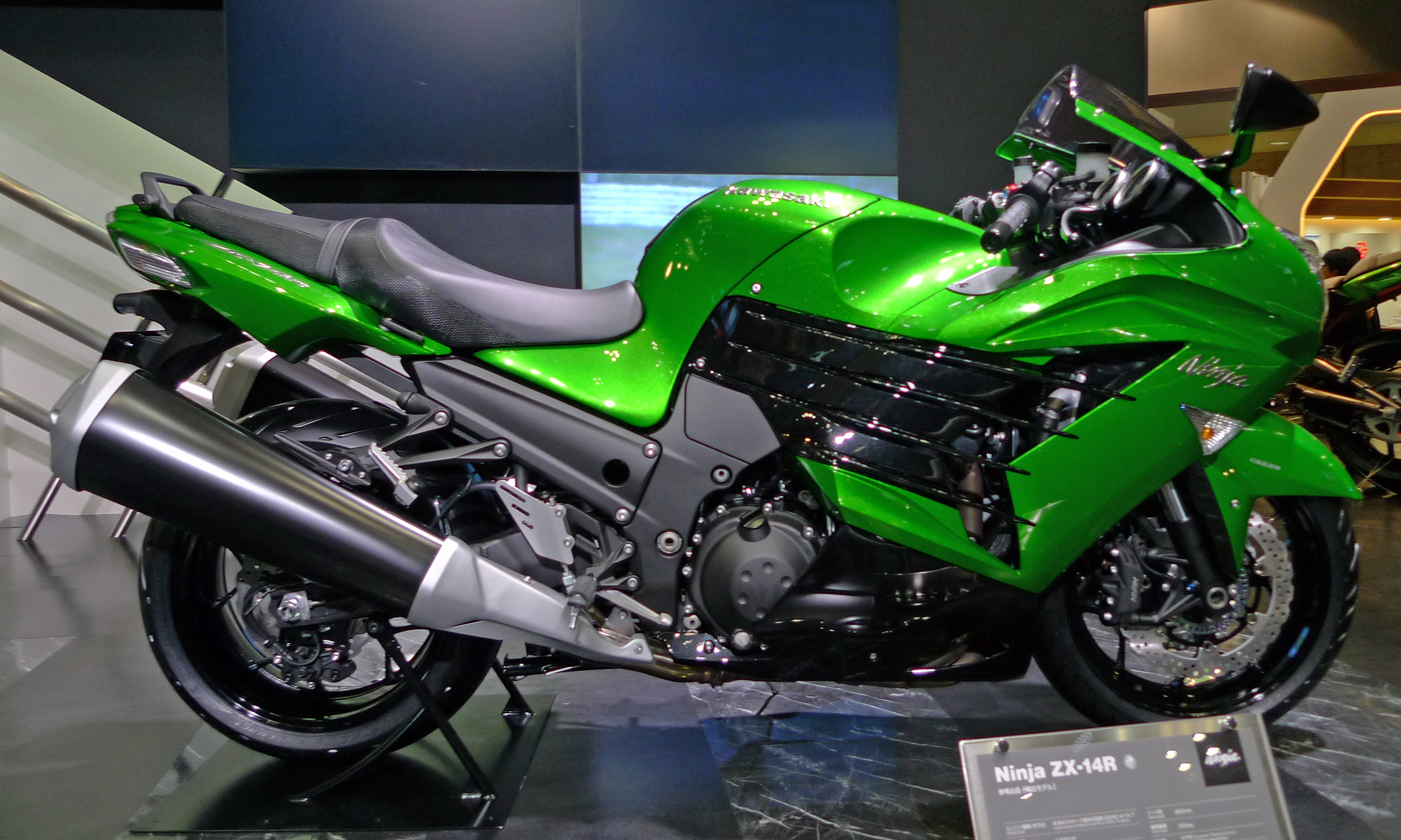 カワサキ・Ninja ZX-14R 2012 東京モーターショー2011にて撮影